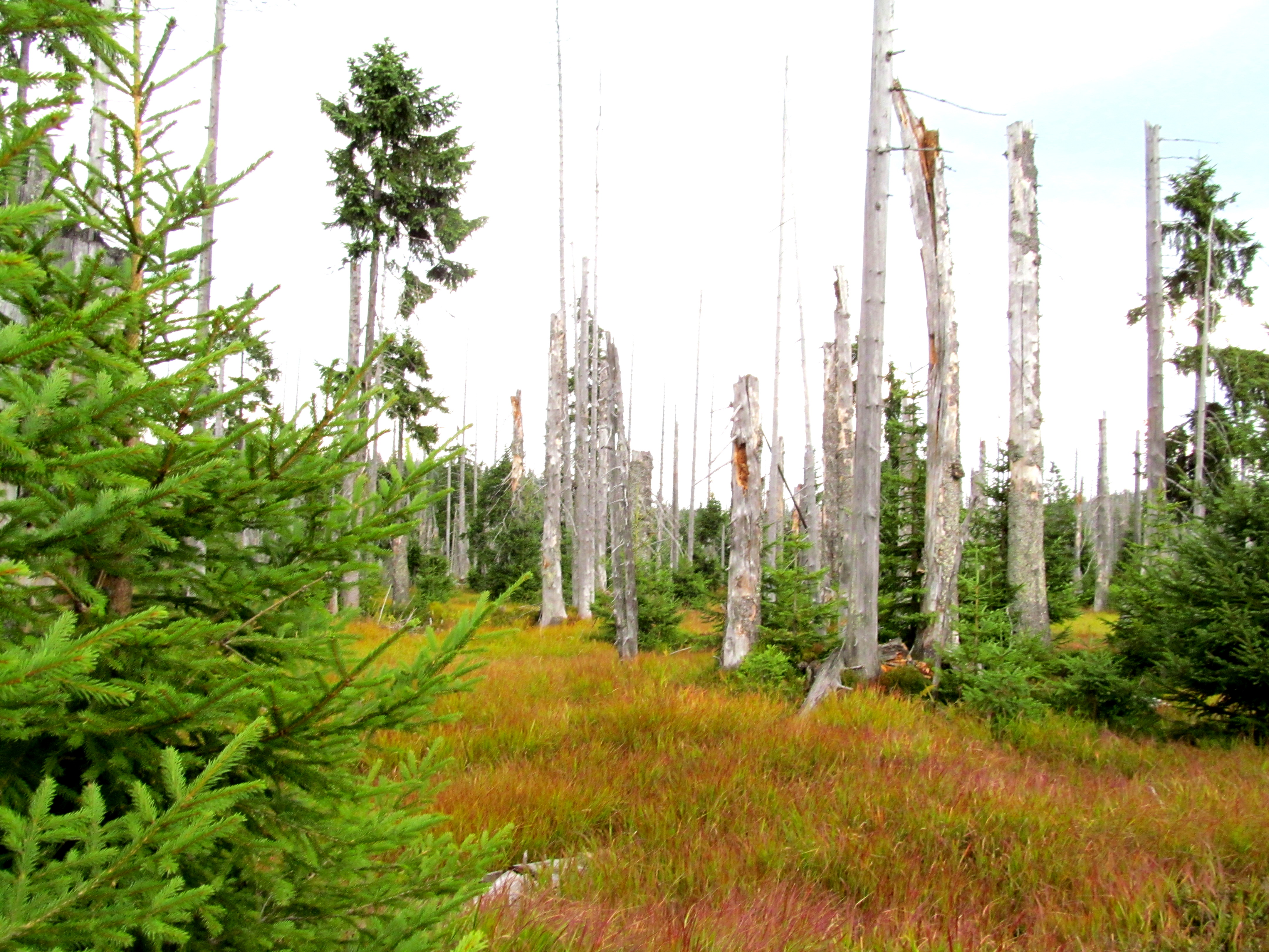 Forêt des Šumava après le passage du scolytes